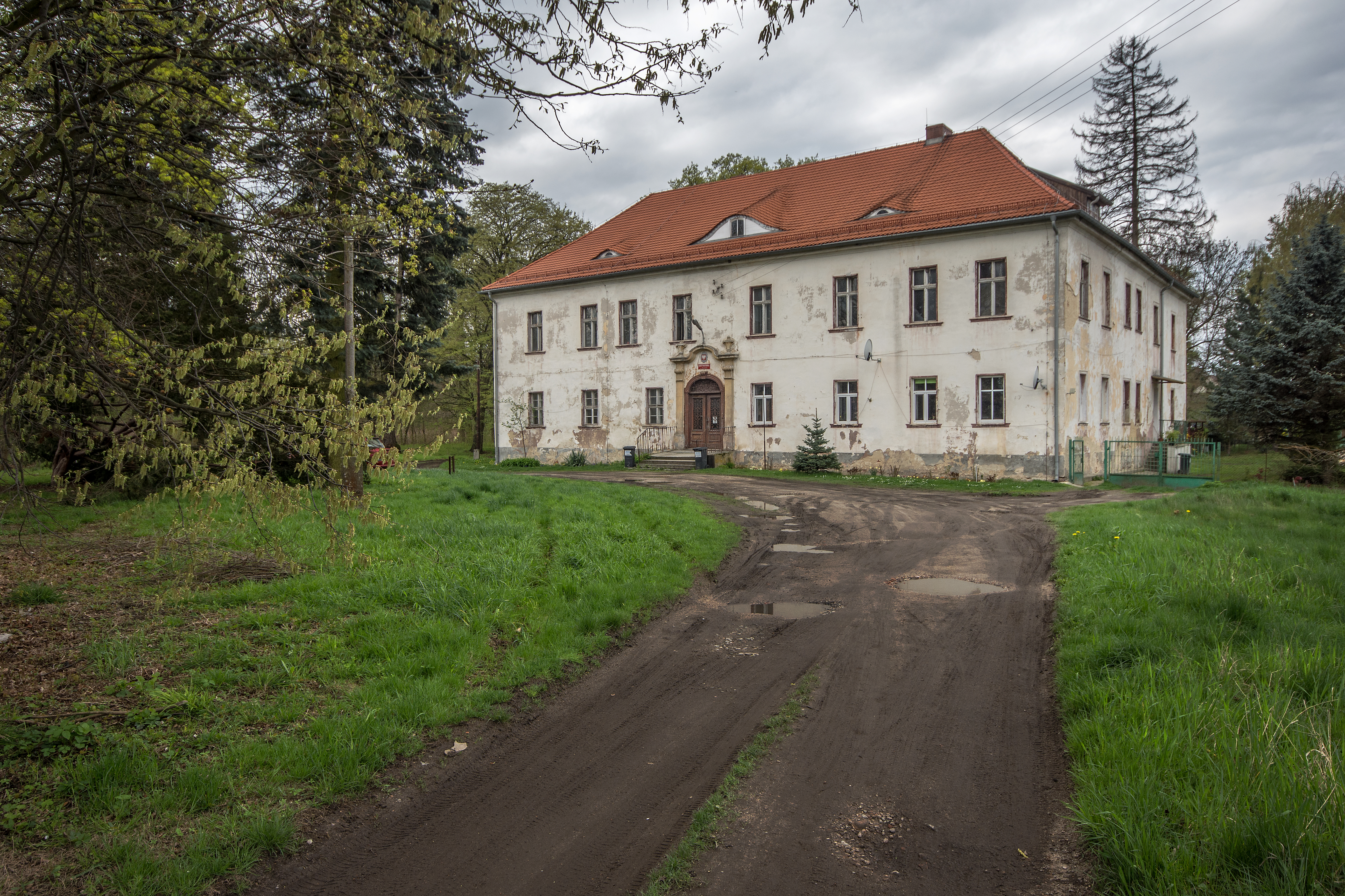 Milin, pałac, ok. 1600, 1749-1750